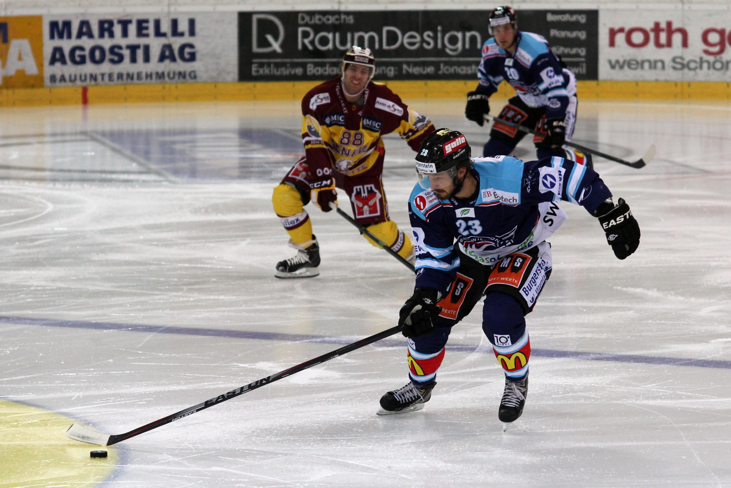 Niklas Persson (RJ 23), Kevin Romy (G 88), Johan Fransson (RJ 20).